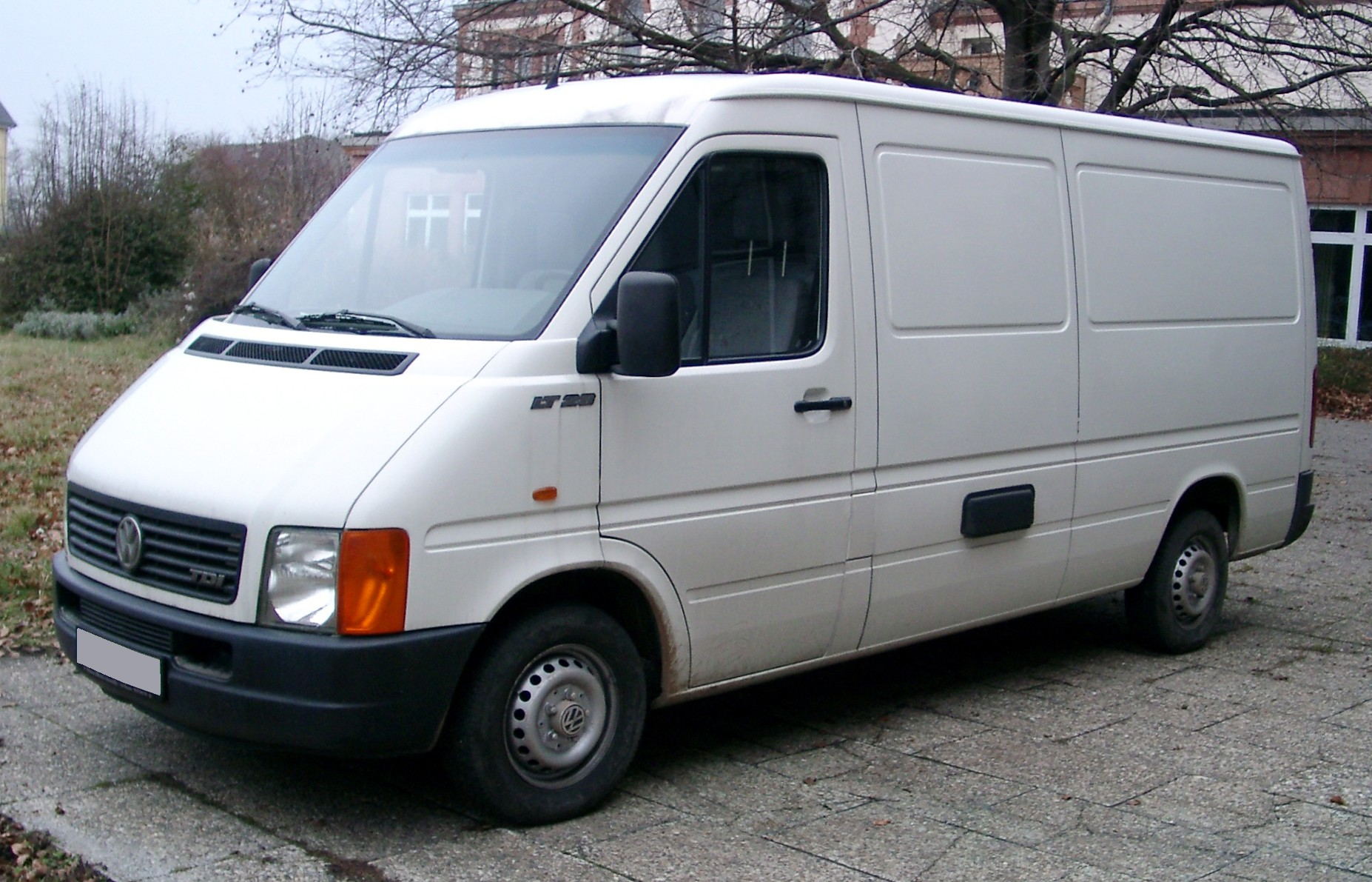 VW LT 28